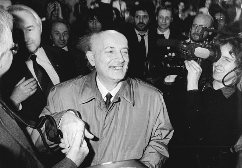 ADN-ZB Gahlbeck 18.3.1990 Leipzig: Wahl 90 Im Wahl-Party-Zelt der CDU wurde der Parteivorsitzende Hans Wilhelm Ebeling von Anhänger und der internationalen Presse in Empfang genommen.